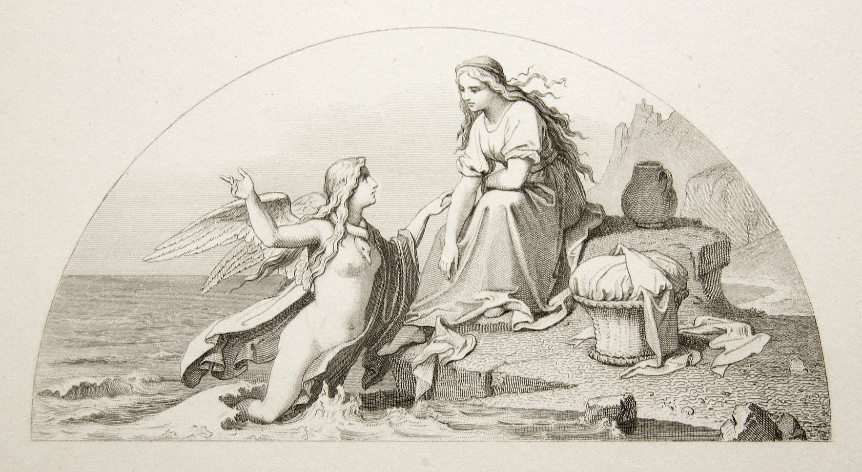 Schloss Schwerin, Kupferstich nach Wilhelm Peters' Wandgemälde Gudrun erhält Nachricht vom Leben ihres Bruders im Sagenzimmer